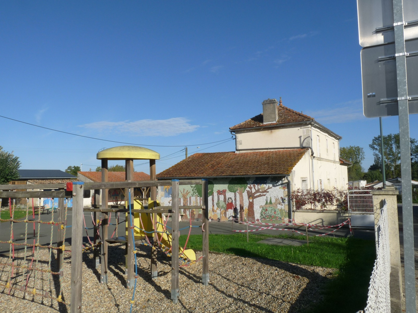 Ecole de Vanzac, Charente-Maritime, France